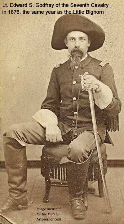 Edward Godfrey